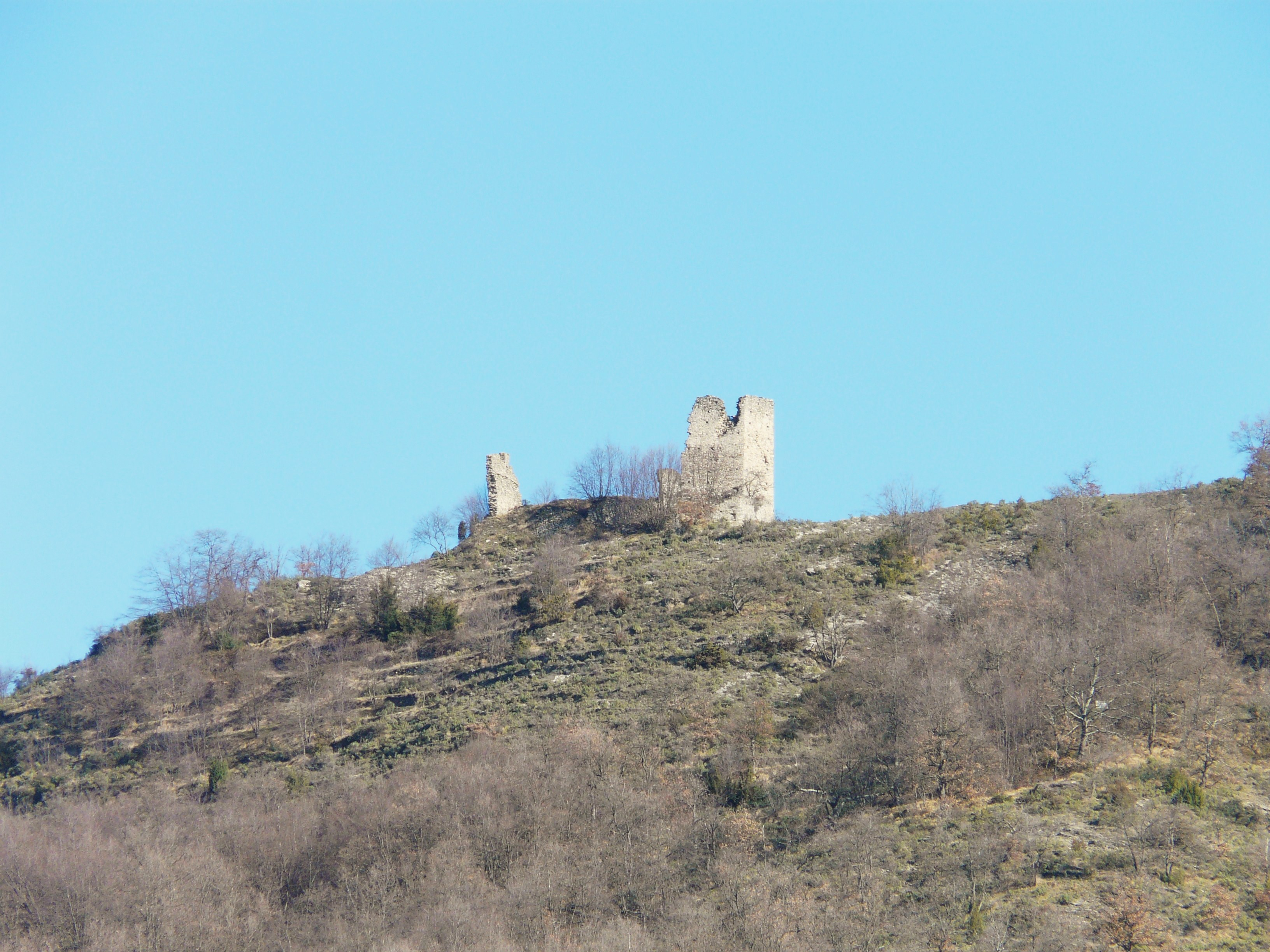 Ruderi del castello, Aquila d'Arroscia, Liguria, Italia